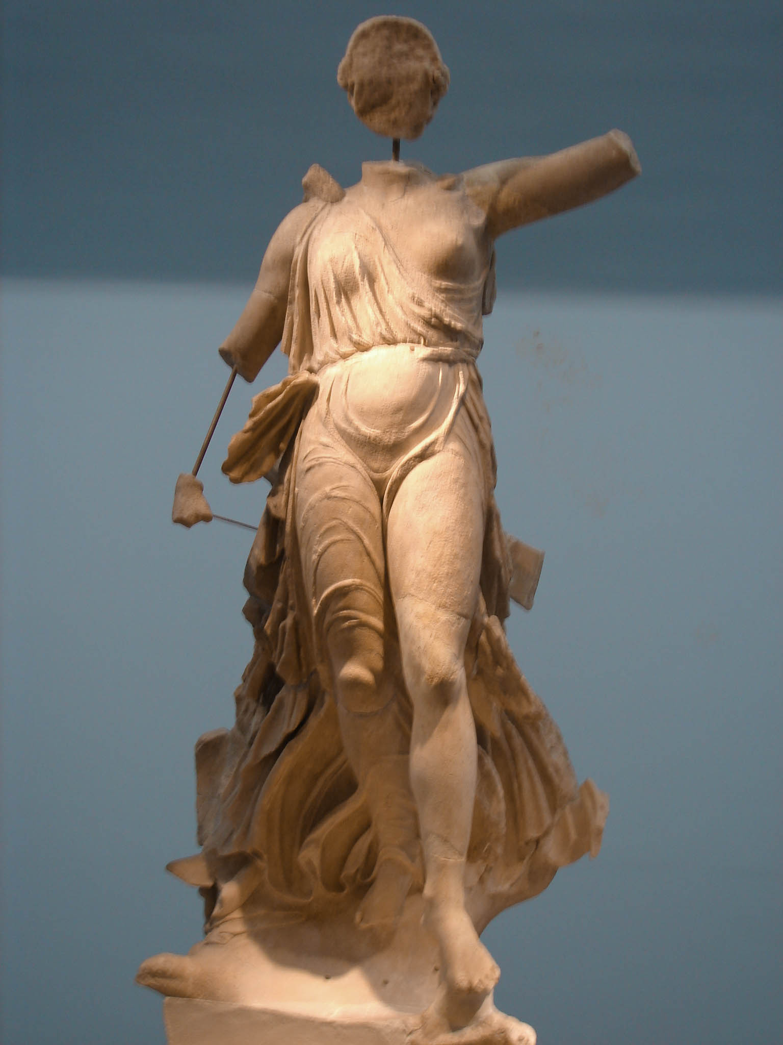 Nike di Peonio di Mende, ad Olimpia.